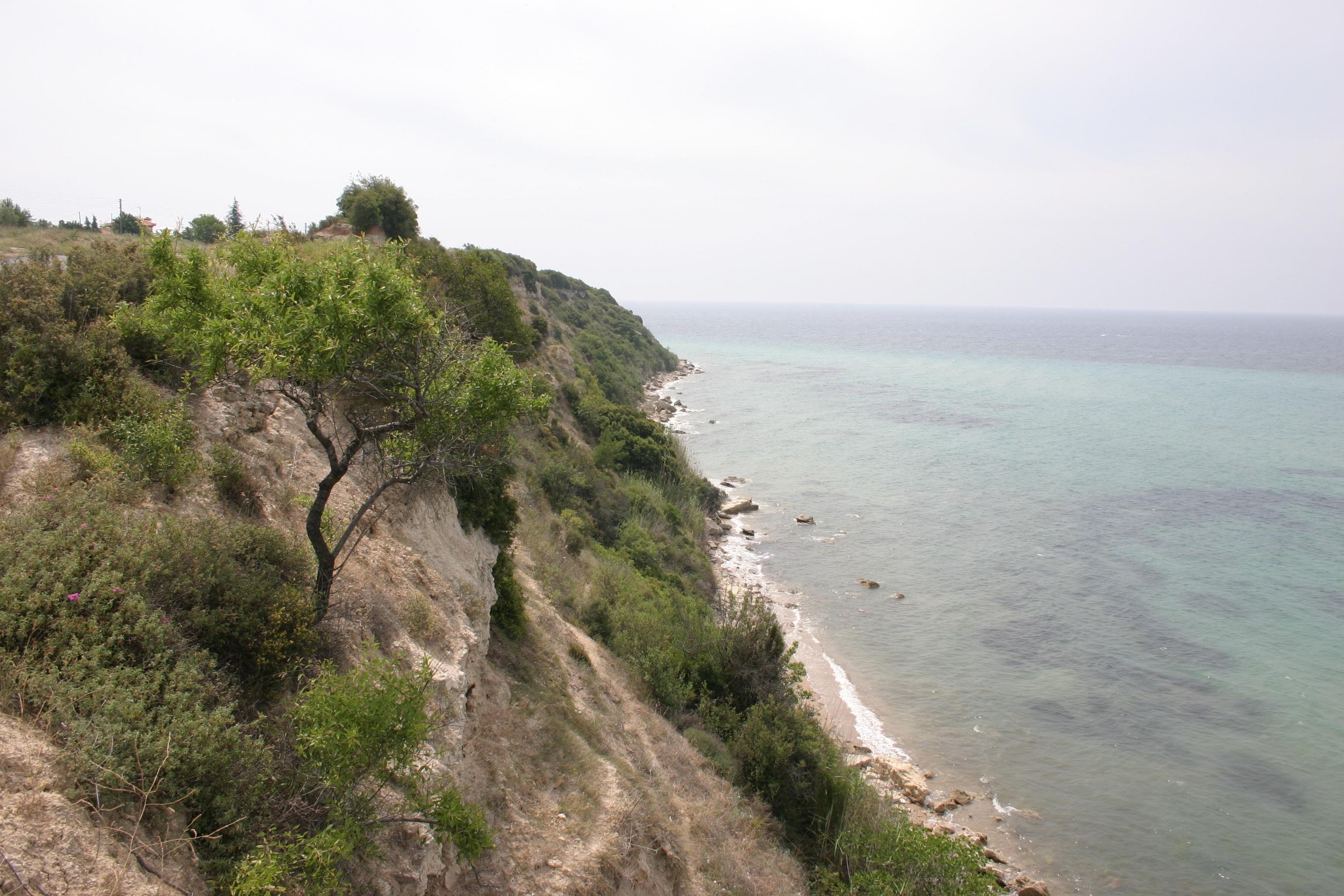 Kallikratia, Chalkidiki, Greece - View on coastline